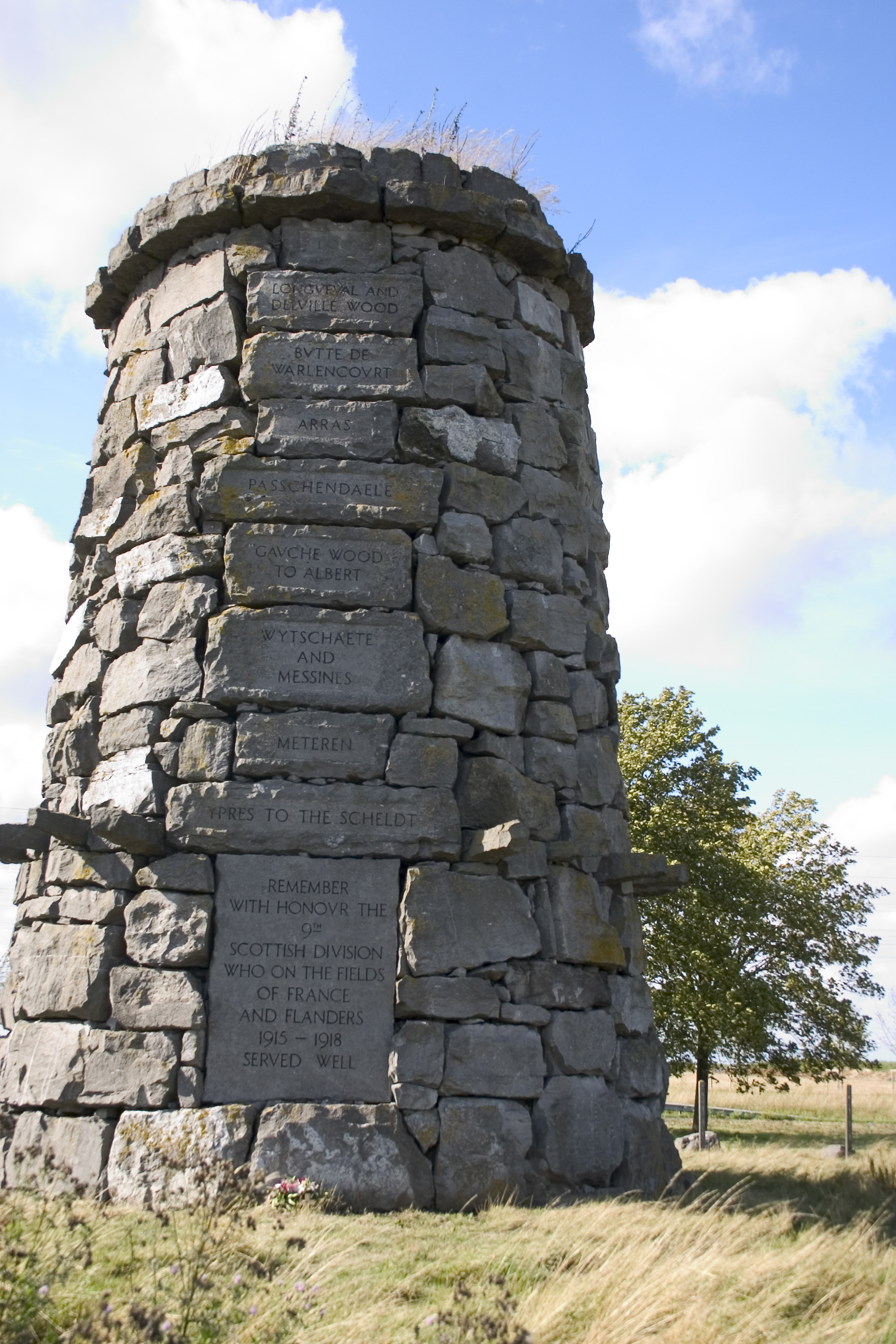 Le monument du 9ème Régiment d'Ecosse le monument du 9ème régiment d'Ecosse